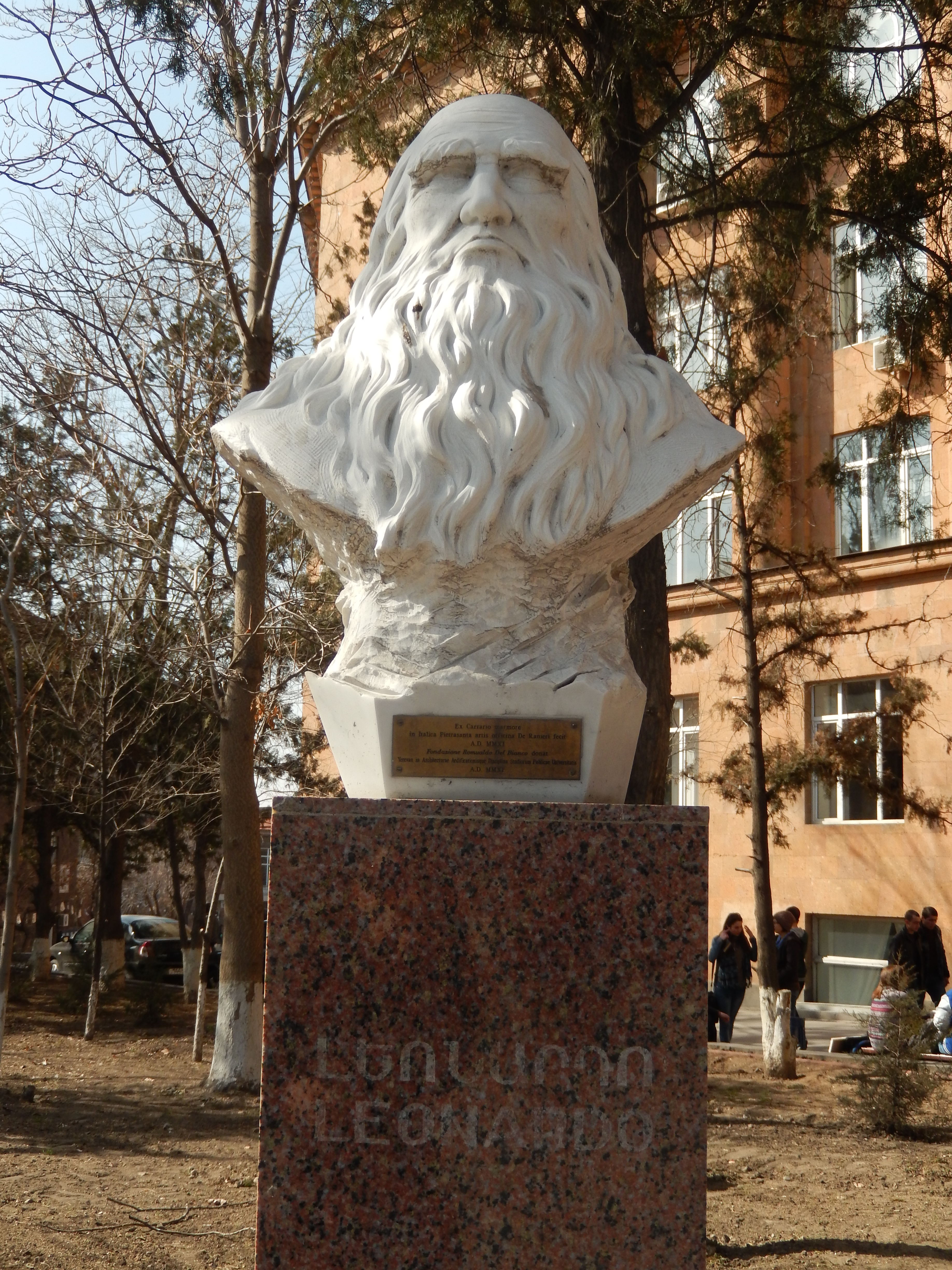 Քանդակագործ` Դինո Դե Ռանիերի